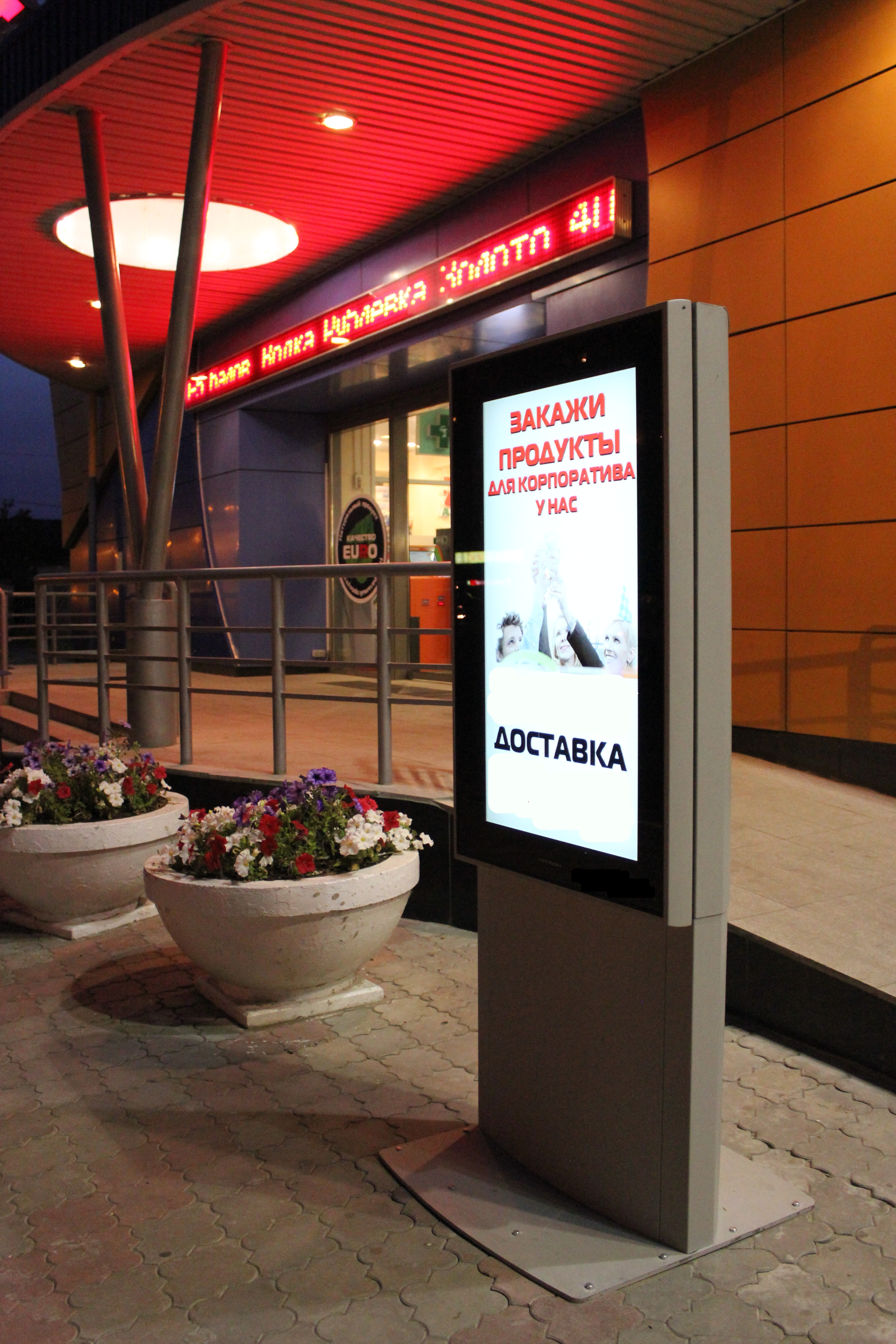 Видео-пиллар, нестандартный рекламный носитель